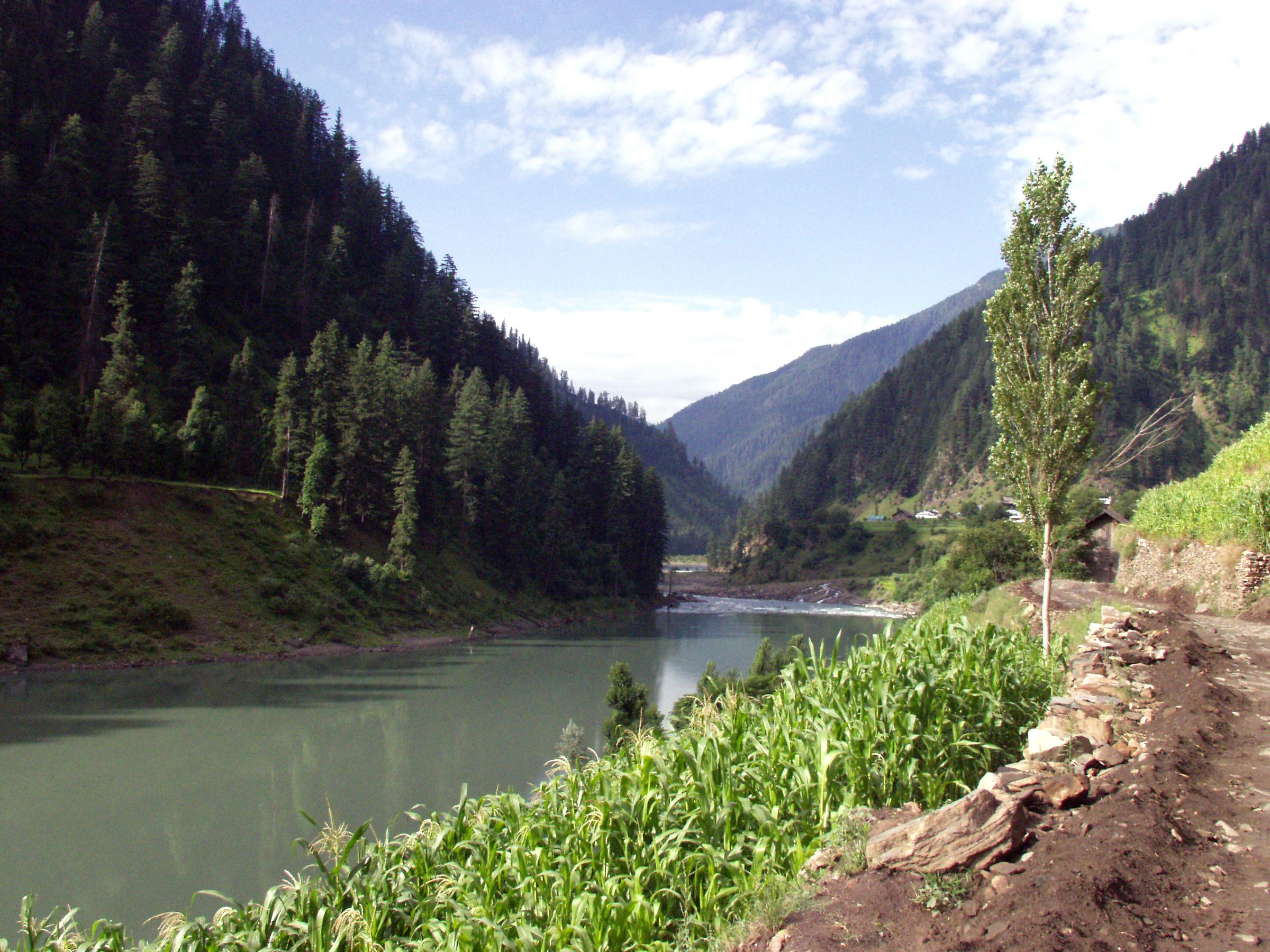 Jhelum River in Pakistan